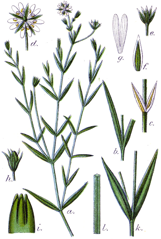 Stellaria palustris Ehrh. ex Retz., syn. Alsine glauca (With.) E.H.L.Krause Original Caption Bläuliche Miere, Alsine glauca